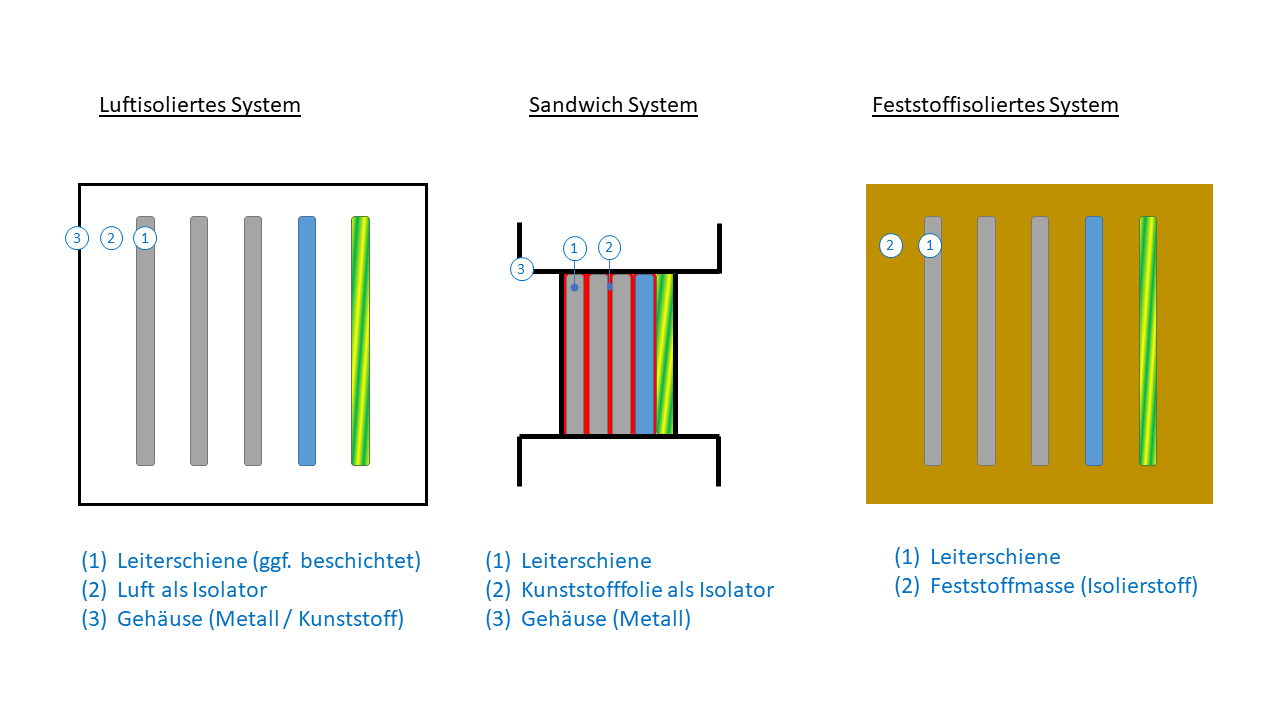 Prinzipieller Aufbau eines Schienenverteilers: Luft-isoliert, Sandwich-Bauweise, Feststoff-isoliert